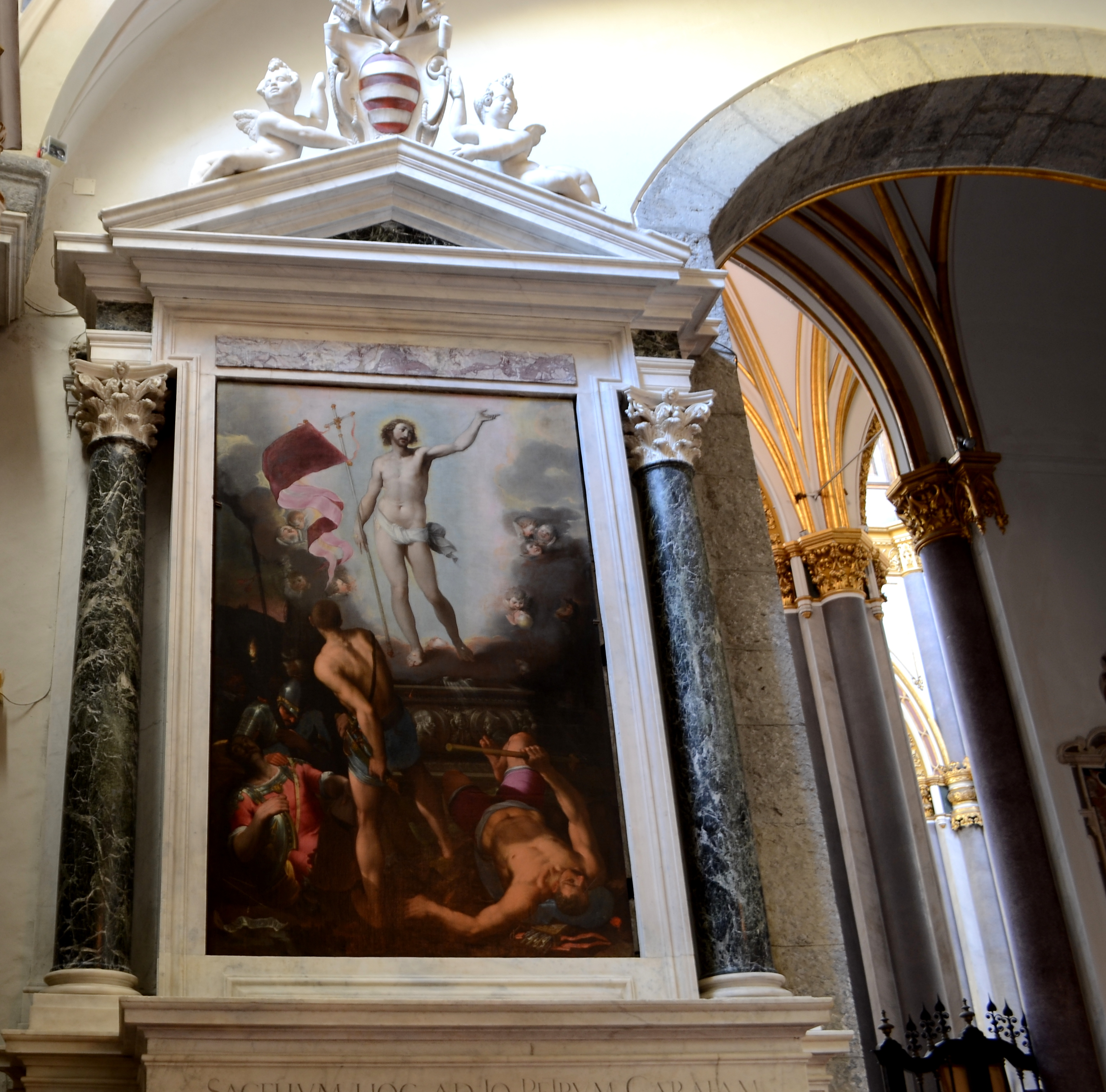 Resurrezione di Wanzel Cobergher (1588) - Altare Carafa nel cappellone del Crocifisso della chiesa di San Domenico Maggiore di Napoli.